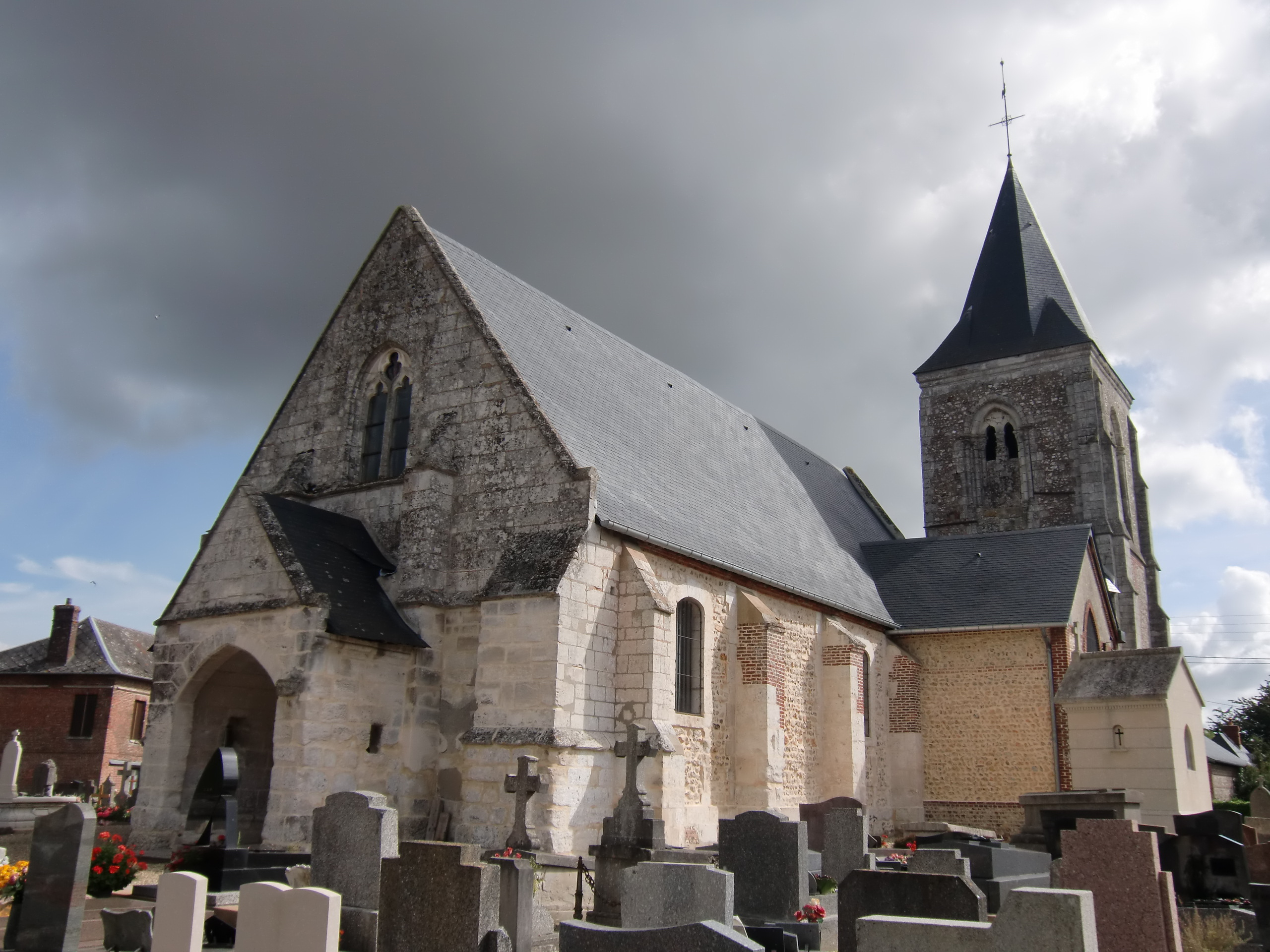 église d'Etréville (Eure, Normandie, France)